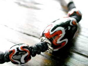 勇士之珠